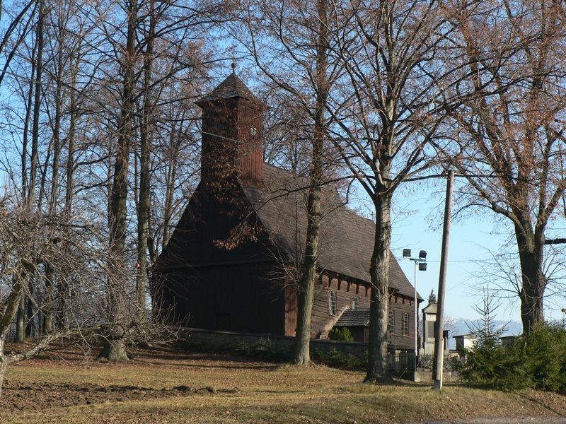 Dřevěný kostel sv. Martina v Žárové.